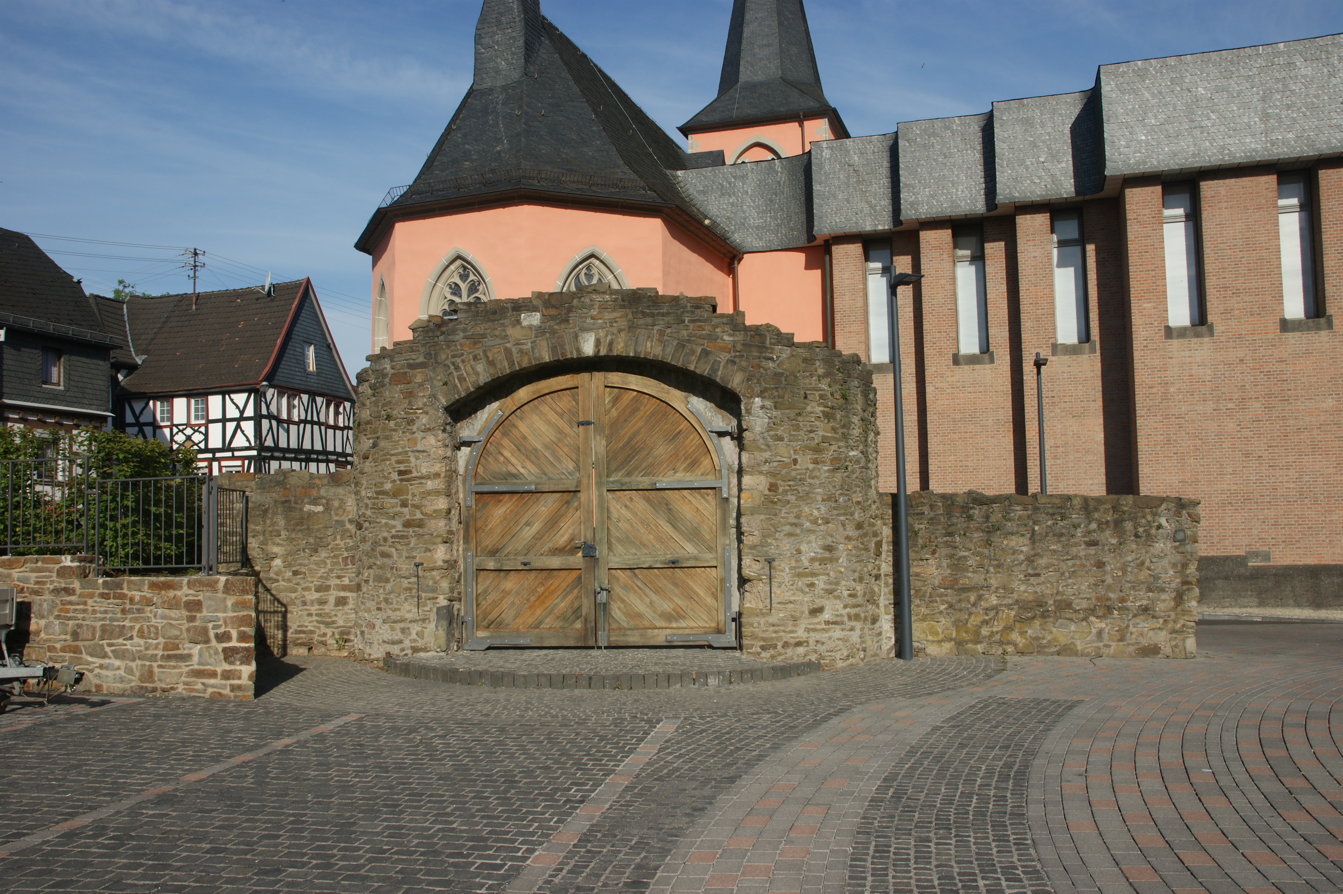 Tor der Unteren Burg in Rheinbreitbach